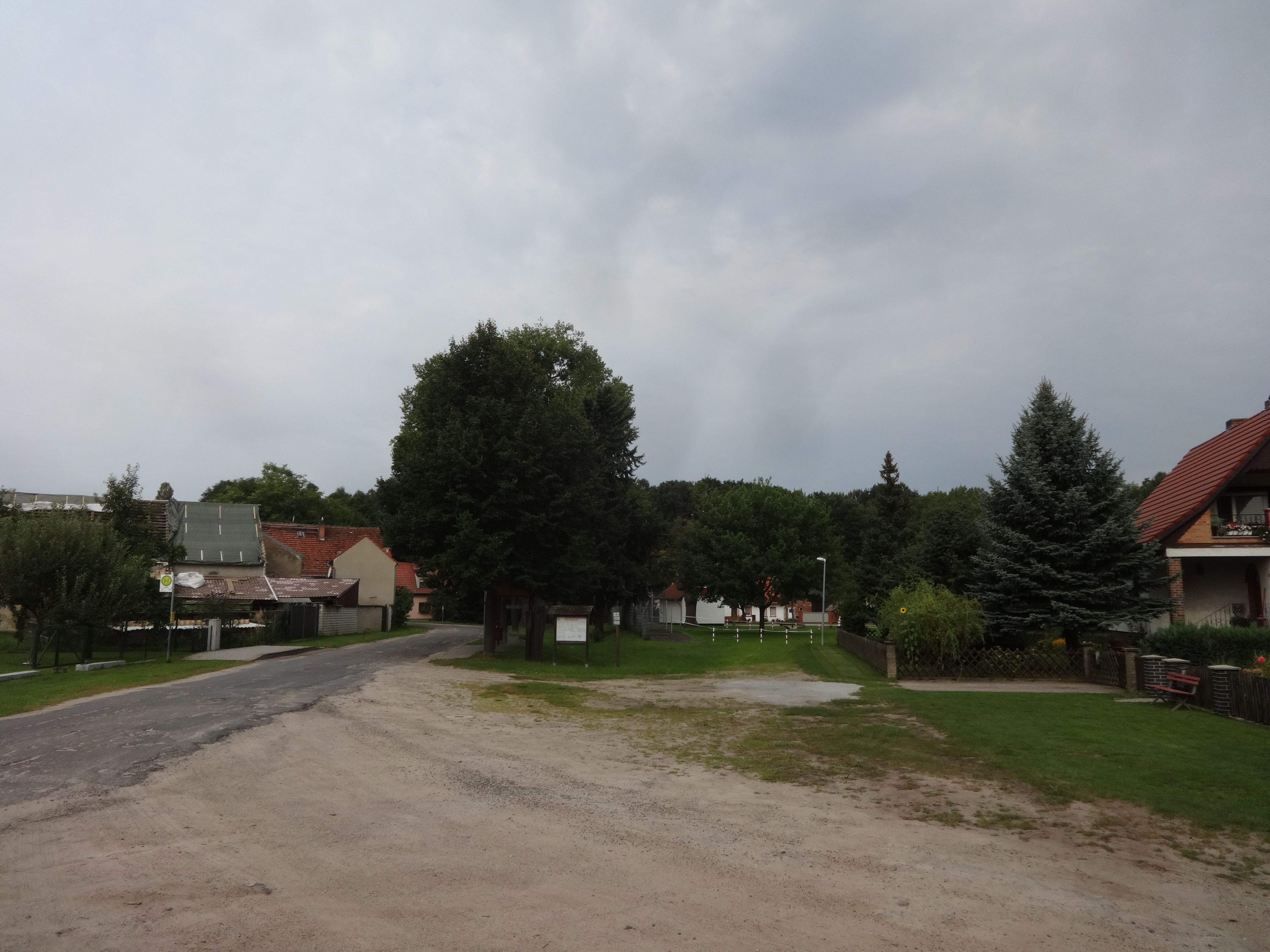 Gottsdorf, einer von 23 Ortsteilen der Gemeinde Nuthe-Urstromtal im Landkreis Teltow-Fläming in Brandenburg.